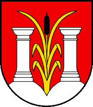 Wappen von Sales (Neu) Kanton Freiburg Schweiz